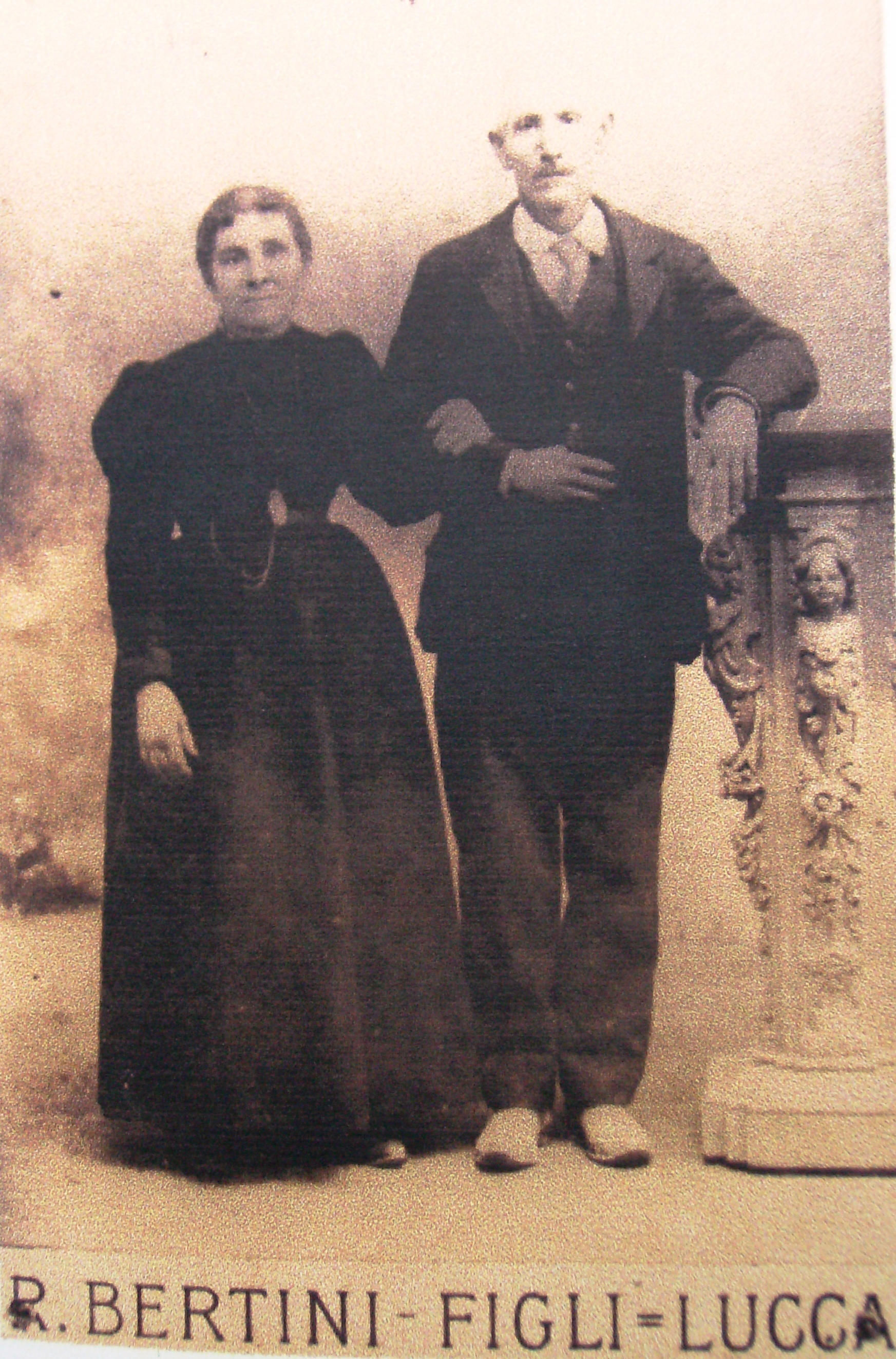 Lucia e Roberto Picchi, Lucca, ca. 1870. Fotografia atual de fotografia antiga.